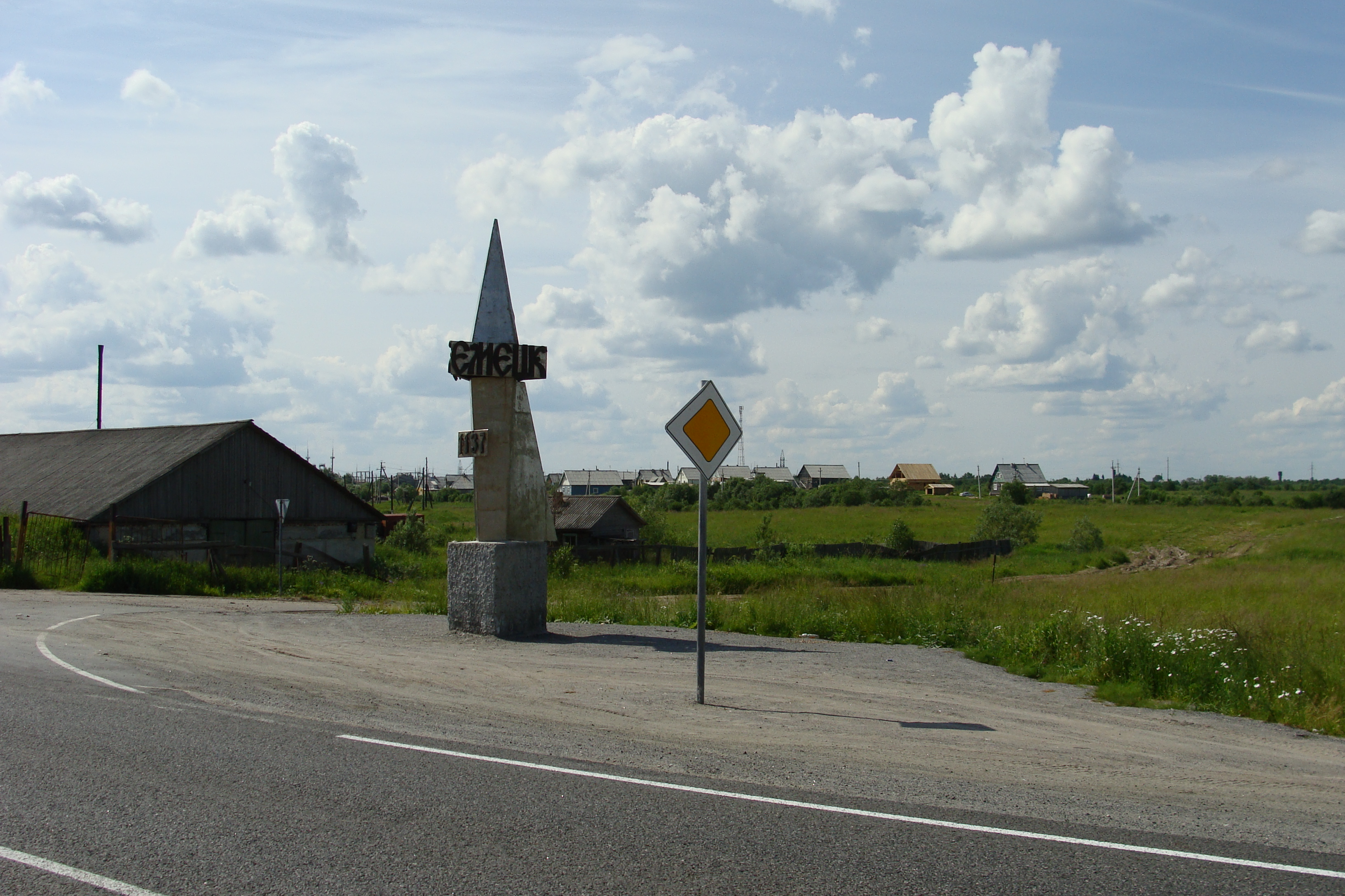 Снято с федеральной трассы М8